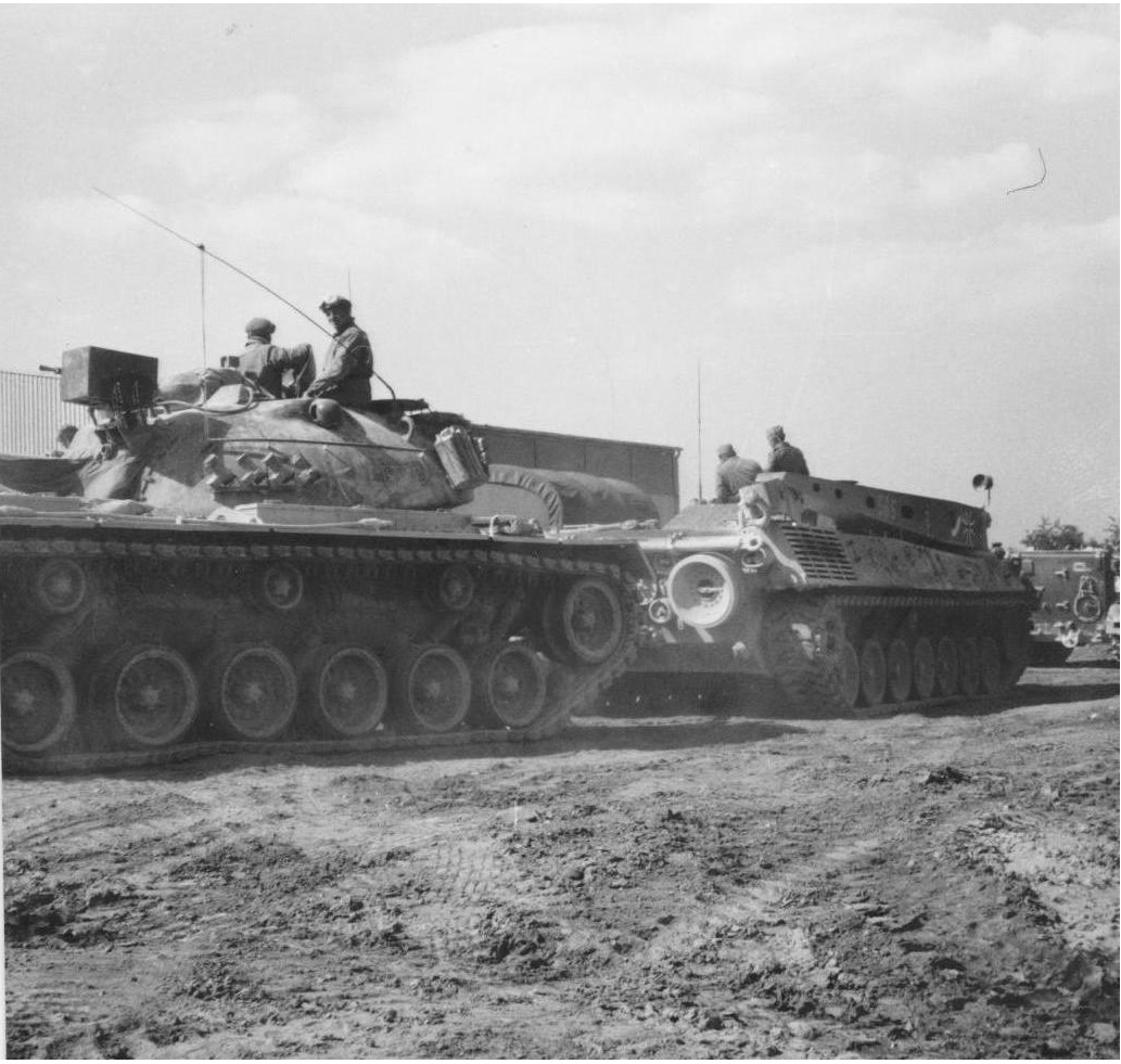 Kampfpanzer M48 am Haken eins Bergepanzers Standard. Juni 1969